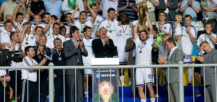 "Динамо" (Київ) володар Суперкубку України 2009